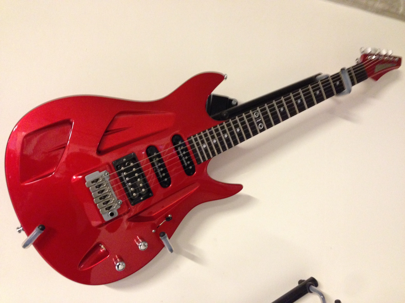 Aristides 010-Red metallic